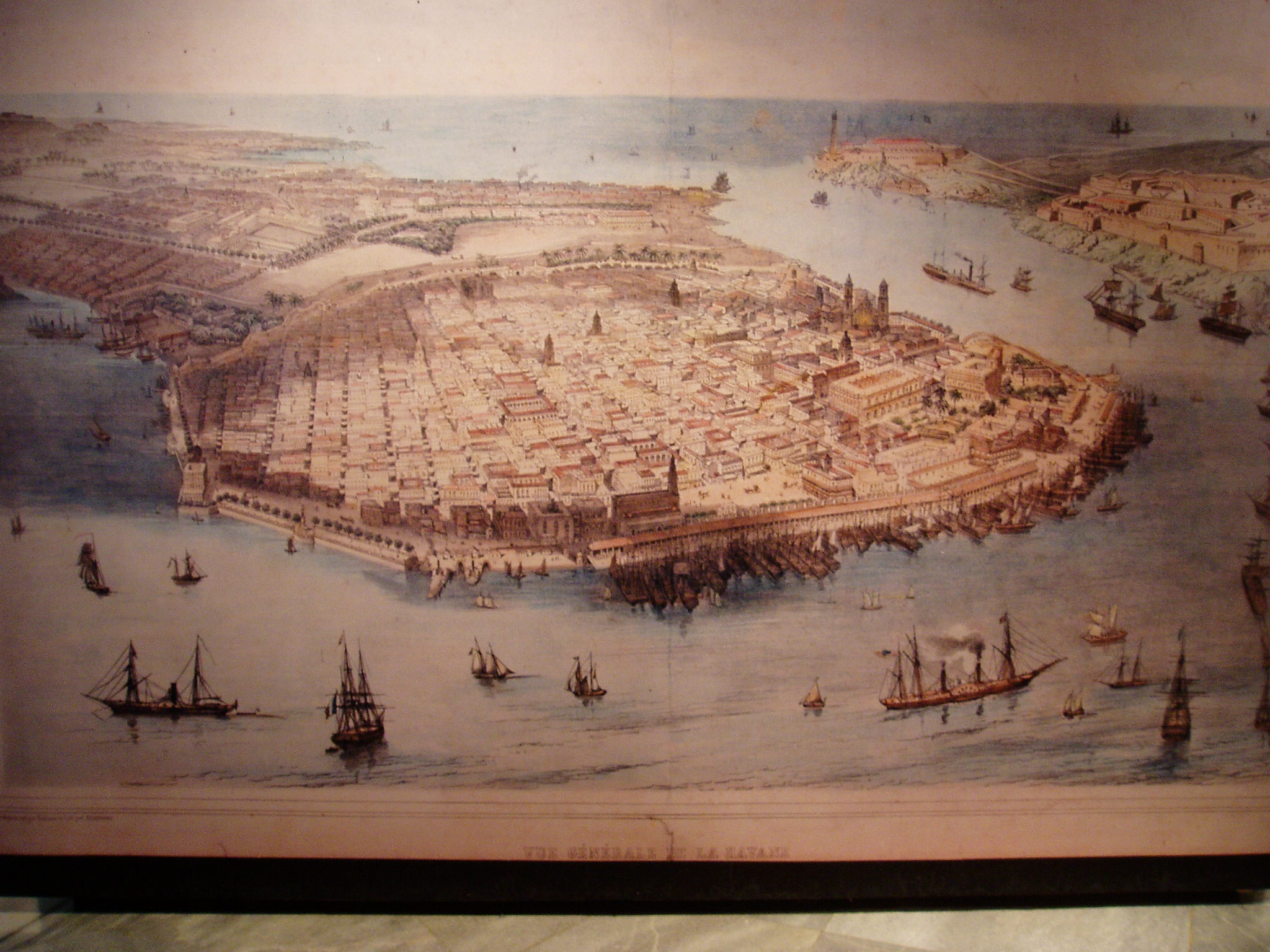 mapa de La Habana Vieja